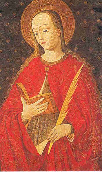 Saint Devota (Sainte Devote)